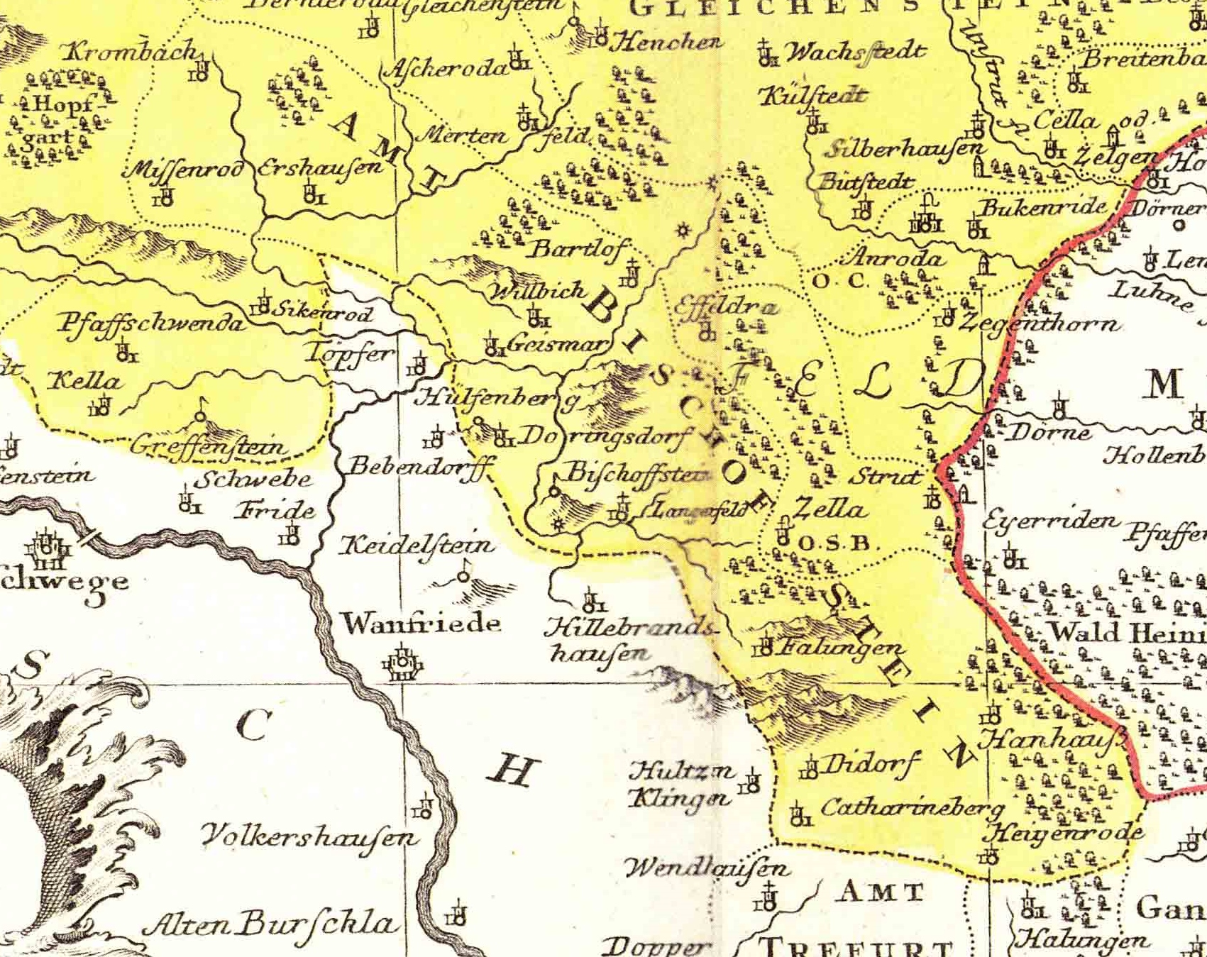 Ausschnitt aus der historischen Karte "Tractus Eichsfeldiae": das Amt Gleichenstein Die Karte weist folgende Fehler auf: Die Orte Töpfer (Großtöpfer), Bebendorff, Hillebrandshausen (Hildebrandshausen) und das Gut Keidelstein (Keudelstein) liegen außerhalb des Eichsfeldes